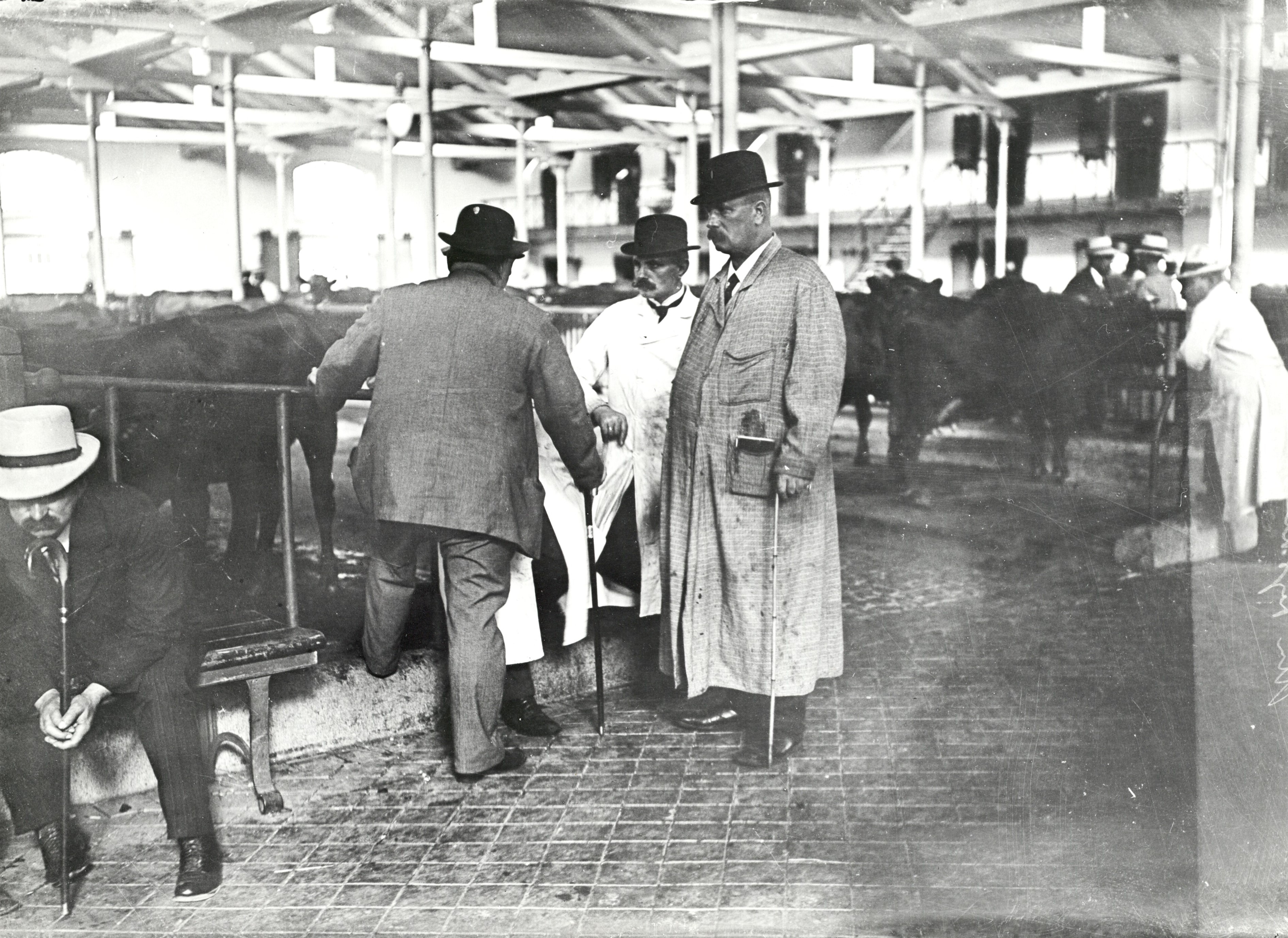 N.P. Nielsen, "Berliner-Nielsen", opkøber kvæg til Tyskland.